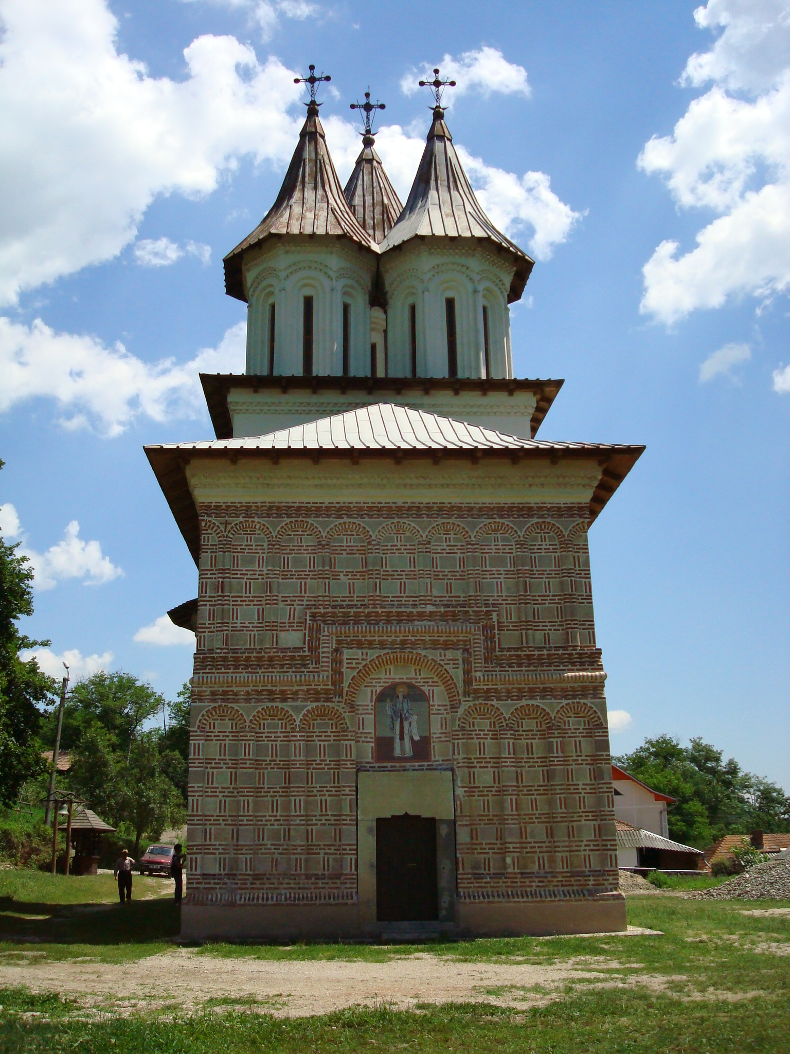 Mănăstirea Tutana, vedere frontala